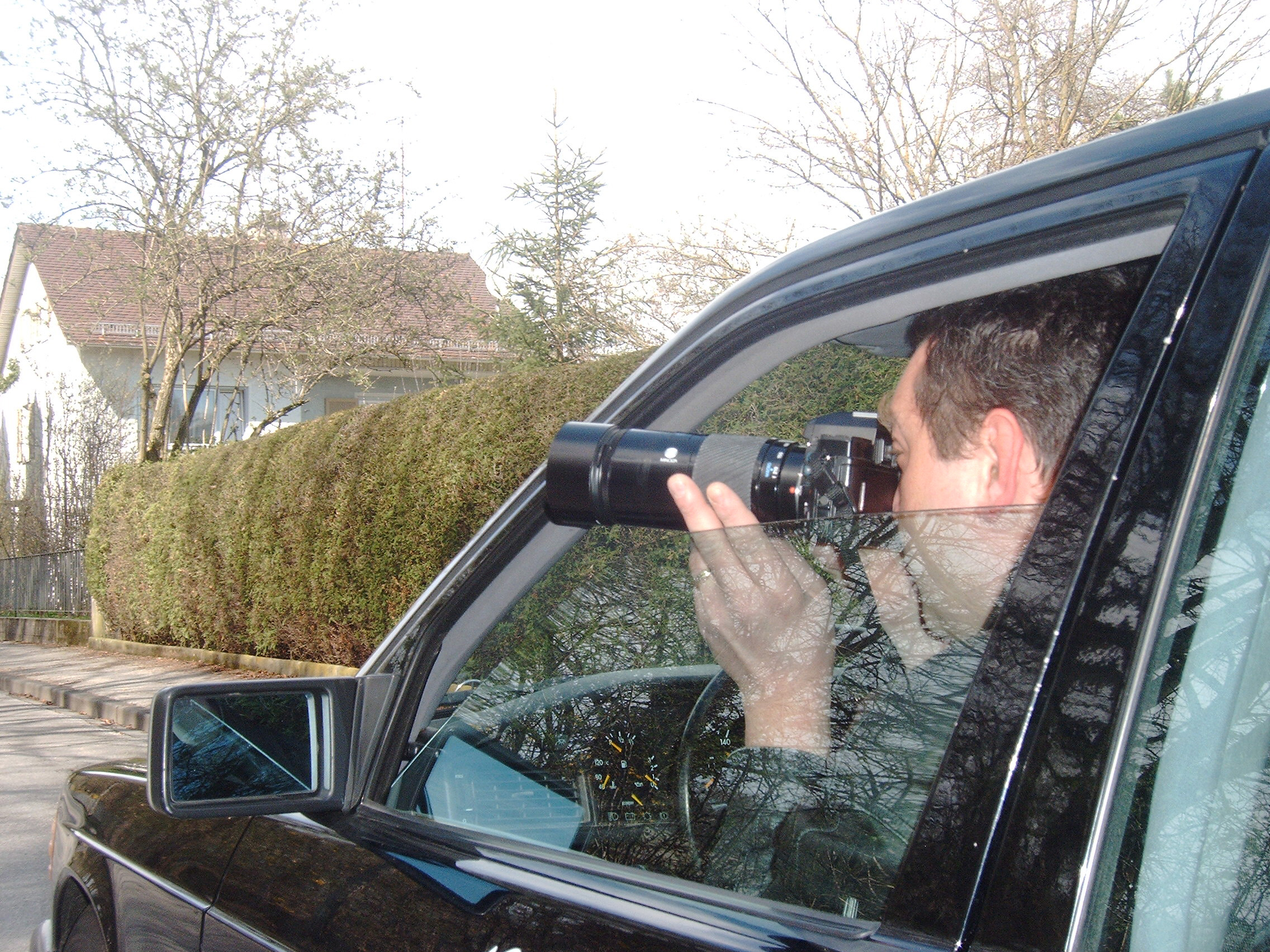 Detektiv fotografiert aus einem Auto